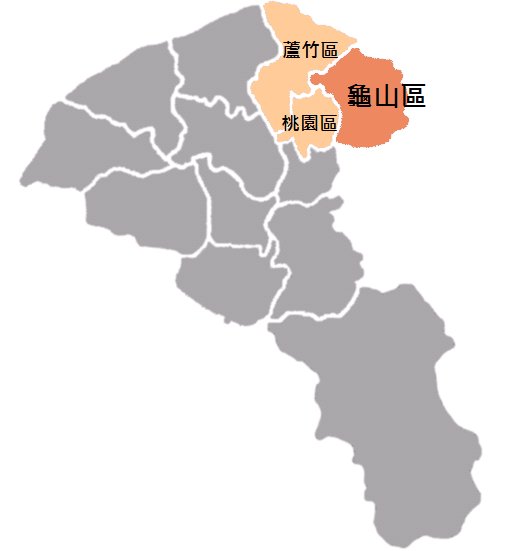 龜山區位置圖